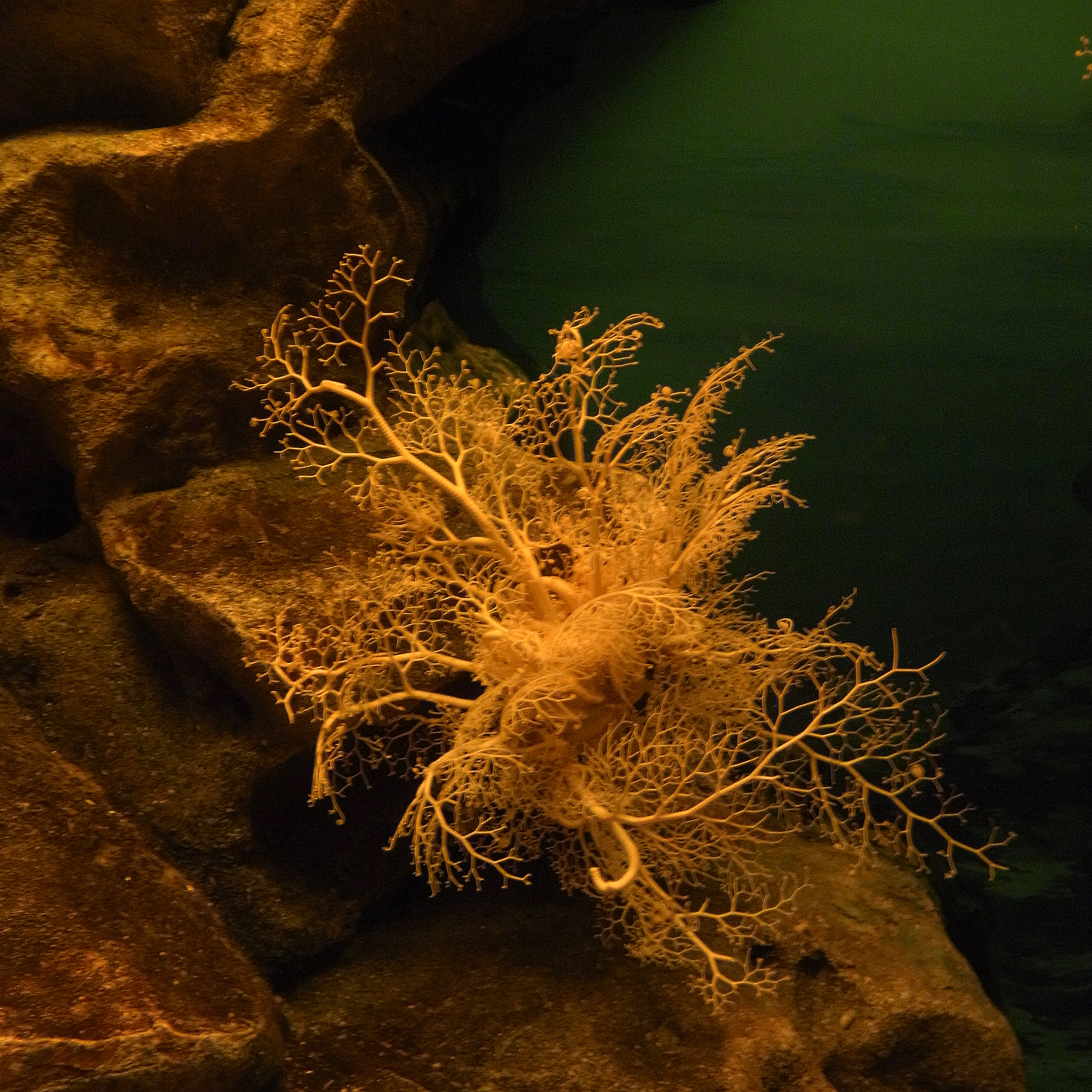 Горгоноцефал Gorgonocephalus eucnemis в океанариуме Тюрауми, Окинава, Япония